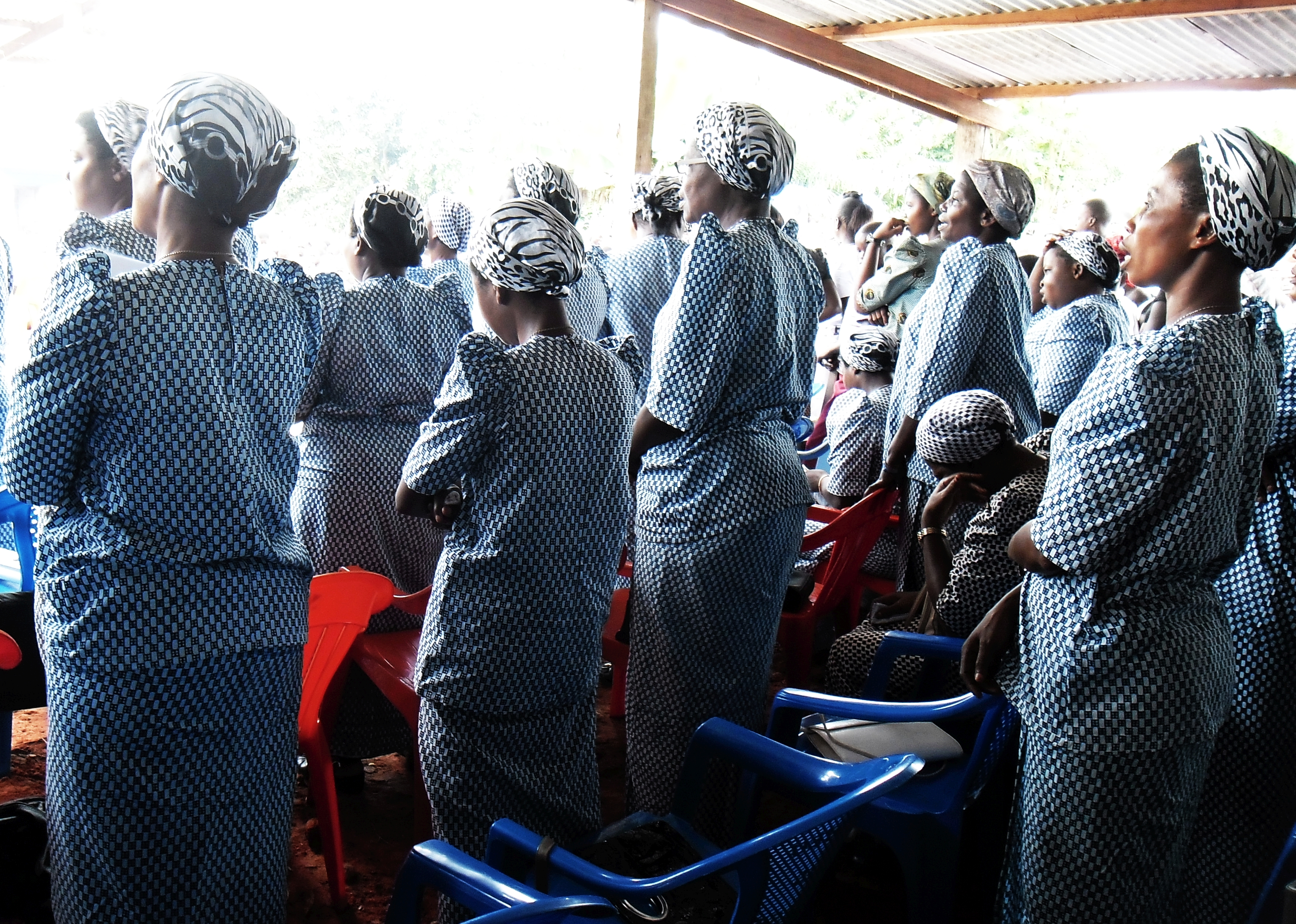 La congrégation des soeurs thérésiennes de Basankusu